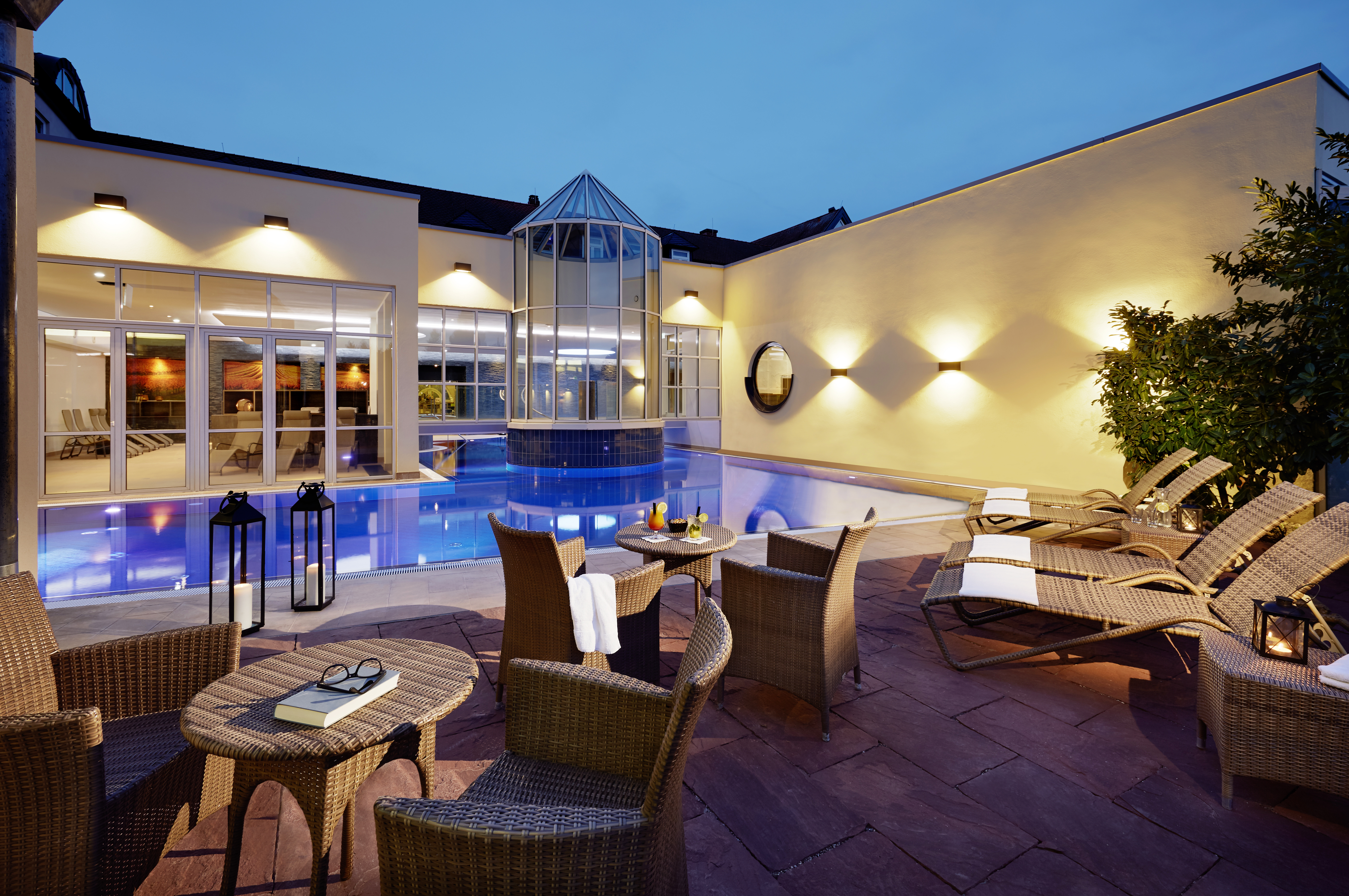 Lindner Hotel & Spa Binshof